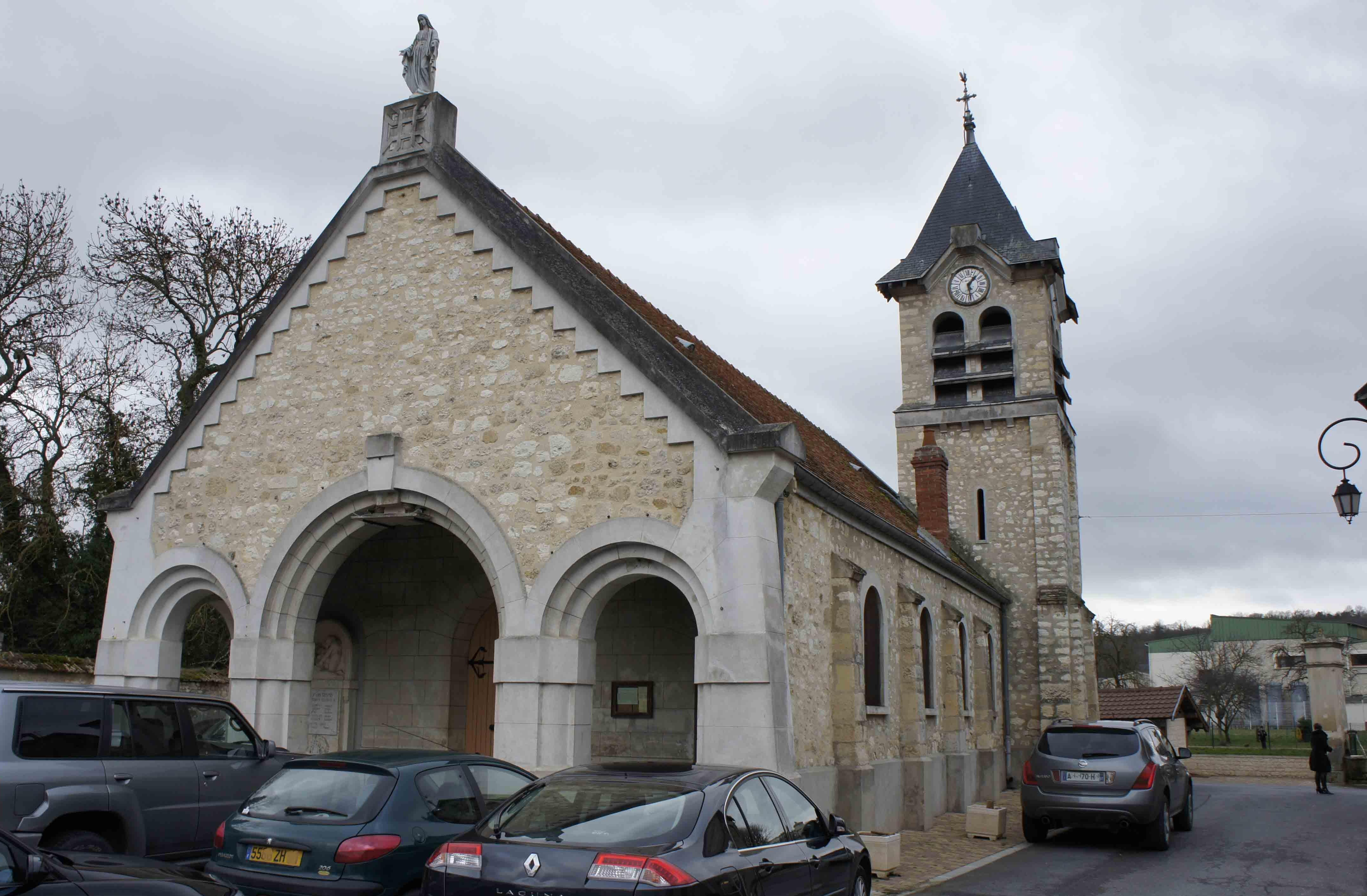 Vue de l'Église Jouy-les-Reims.